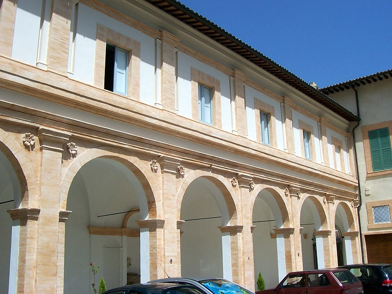 Spoleto - Palazzo Vescovile (sede del Museo Diocesano)